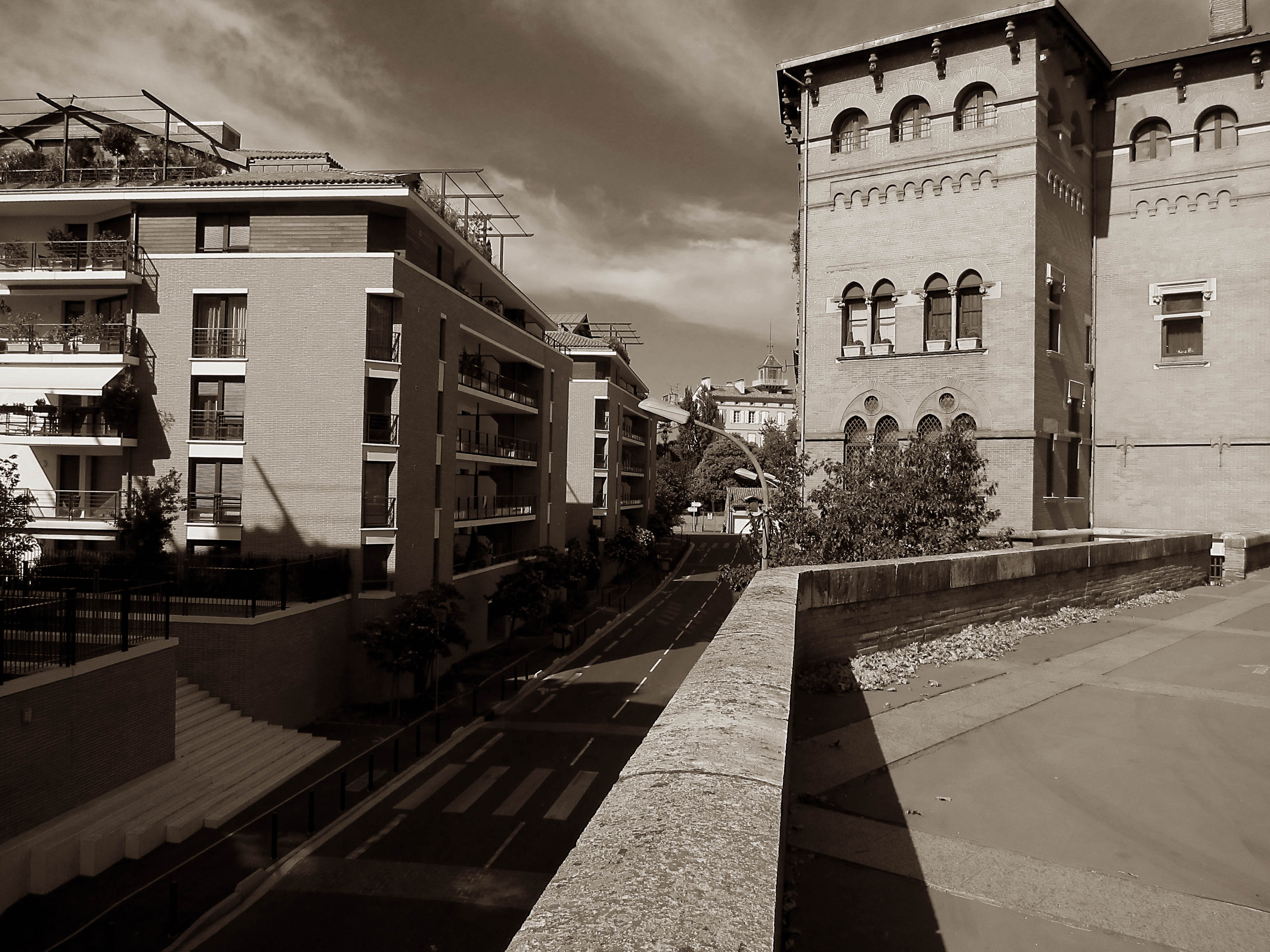 Toulouse (Haute-Garonne, Midi-Pyrénées, France) : La rue de la Chaussée vue depuis l'allée Paul Feuga. Sur la gauche, l'immeuble de Seube.